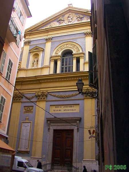 Nice - Quartier de la Vieille Ville Eglise du Jesu, rue droite Par bonheur, une minuscule placette permet un petit recul pour constituer cette prise de vue. Orientation Est.